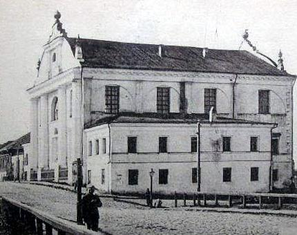 Wielka Synagoga w Witebsku